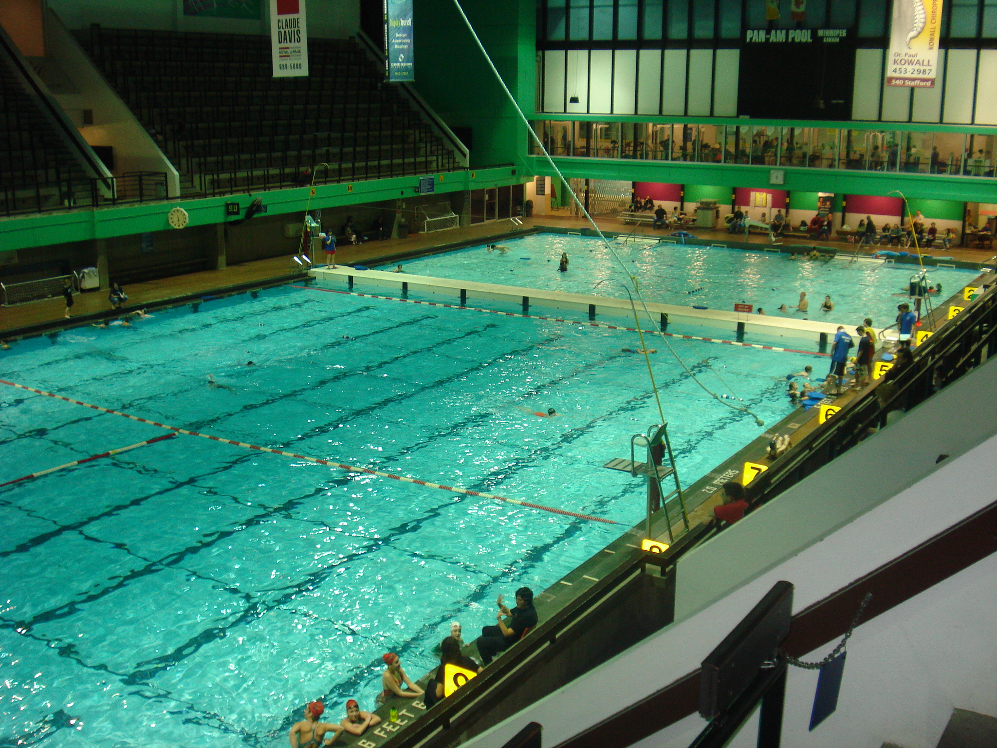 Panam Pool - Winnipeg, MB - Canada